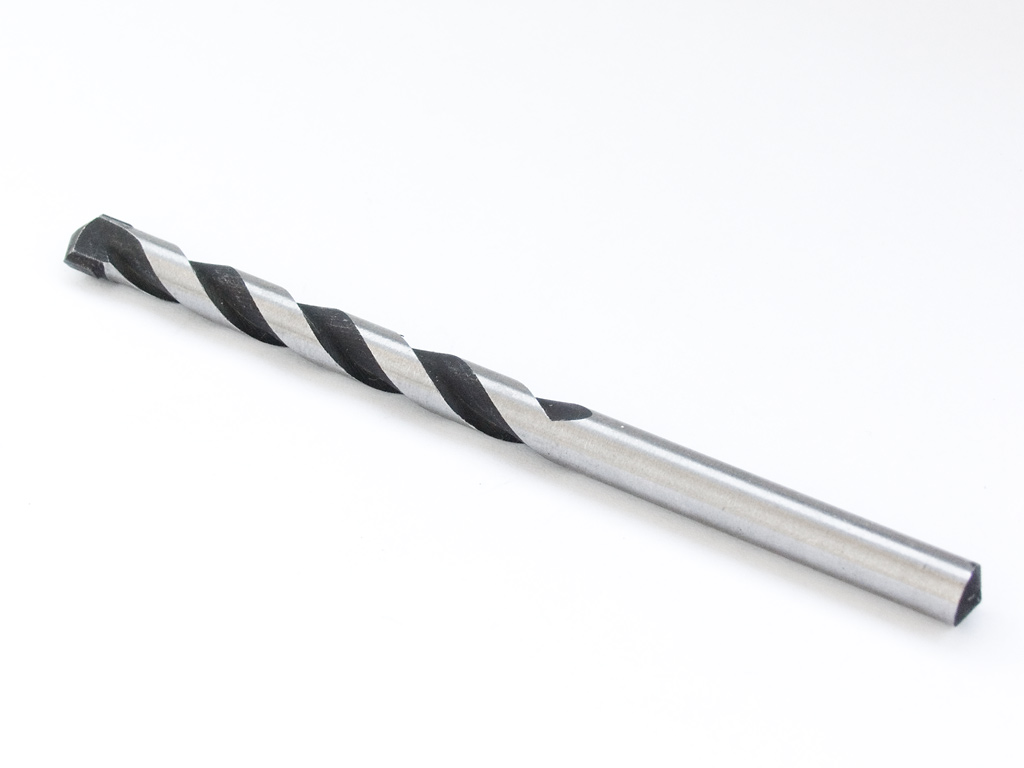 Grąžtas.